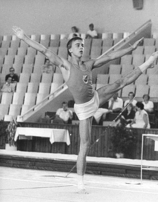 Sylvio Kroll ADN-ZB Schindler 18.8.83 Berlin: 35. DDR-Meisterschaften im Turnen -Sylvio Kroll setzte sich zum Auftakt der Titelkämpfe in der Dynamo-Sporthalle nach der Pflicht am 17.8. an die Spitze des 23köpfigen Teilnehmerfeldes der Männer. Der 18jährige Cottbuser kam auf ausgezeichnete 56,65 Punkte und erhielt auf der Bodenmatte (Foto) die Note 9,50.